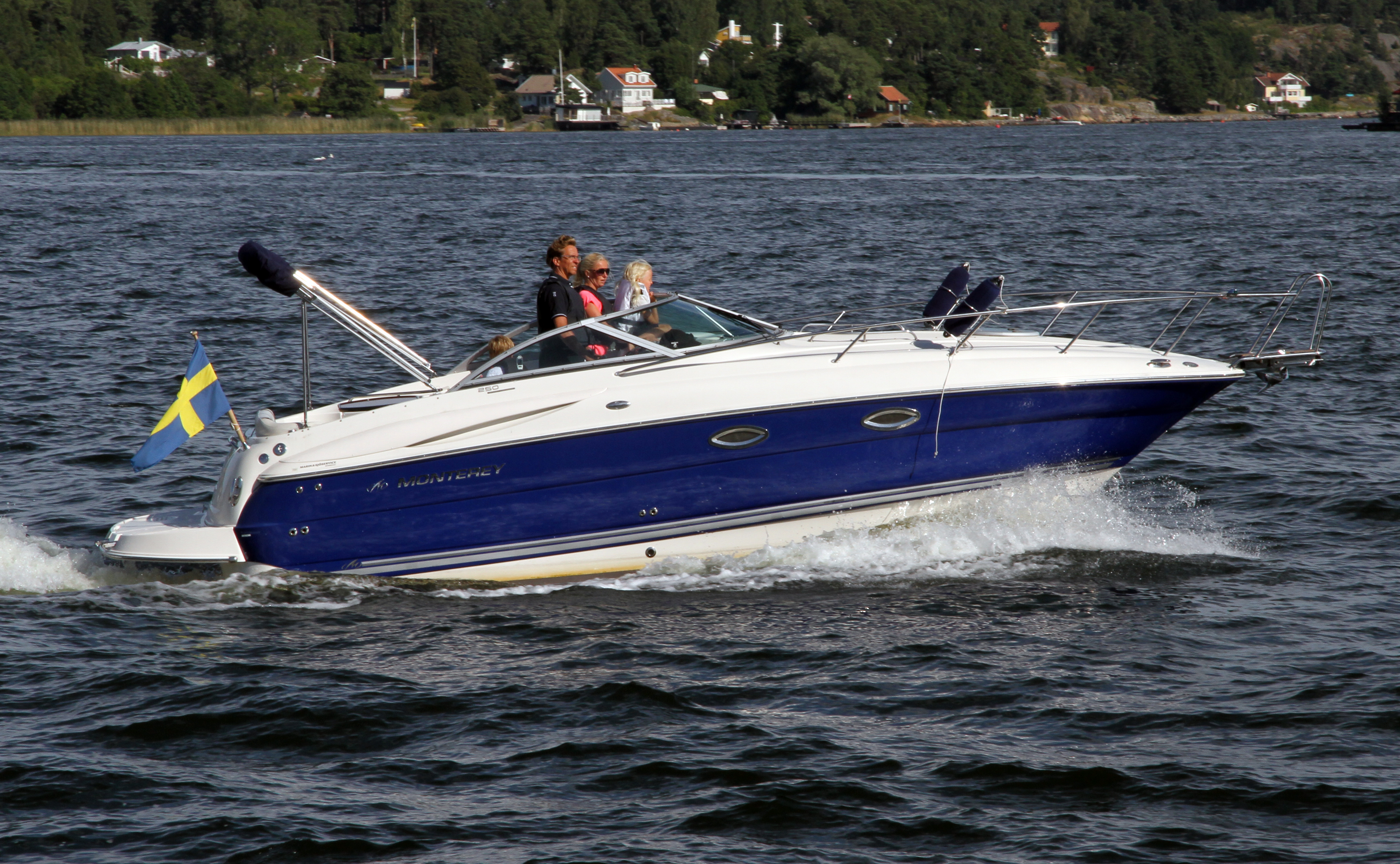 Monterey 250 CR i Vaxholm, Stockholm 4 augusti 2015